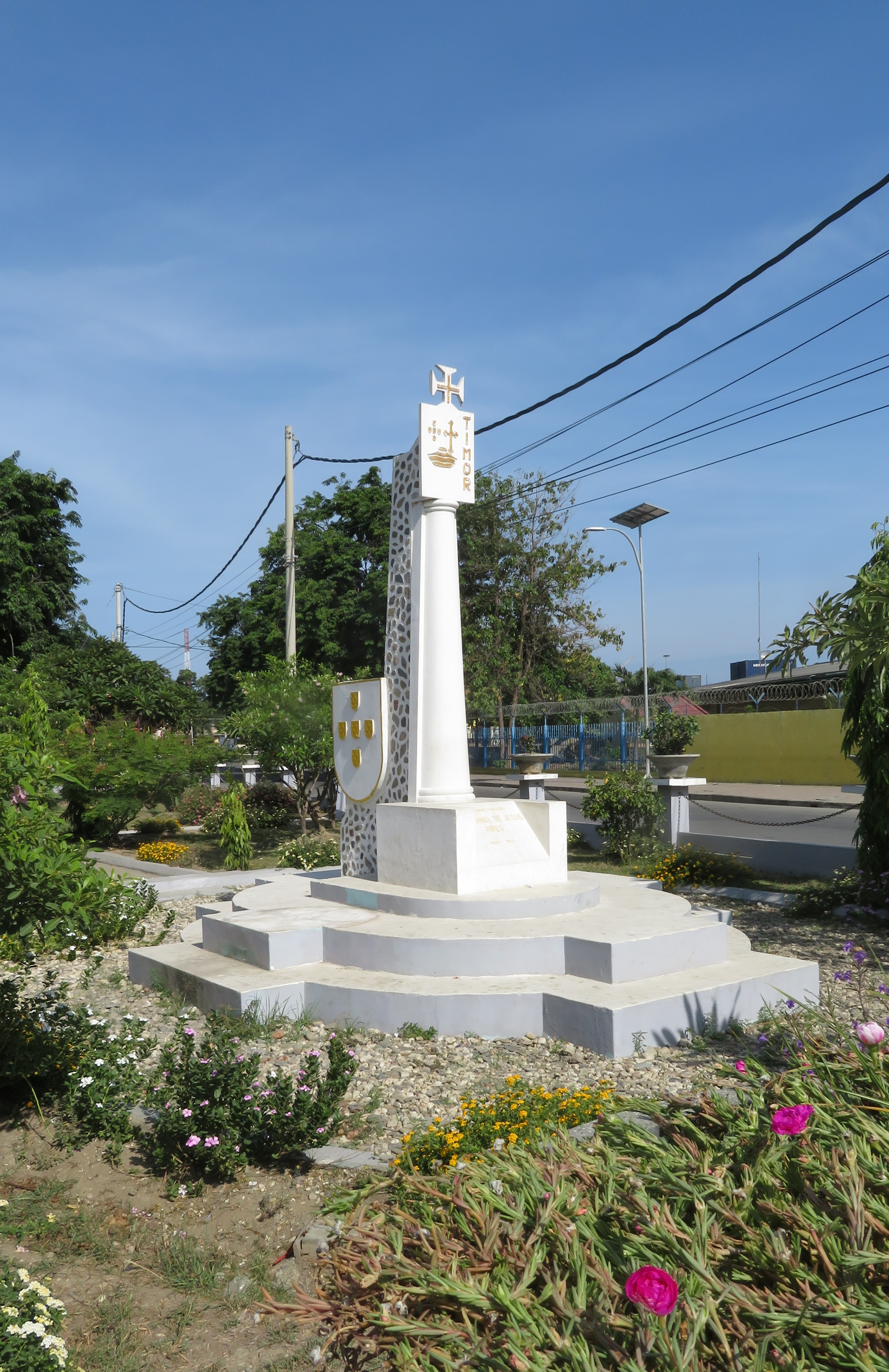 Denkmal für Manuel Jesus Pires (1895-1944), Dili, Osttimor